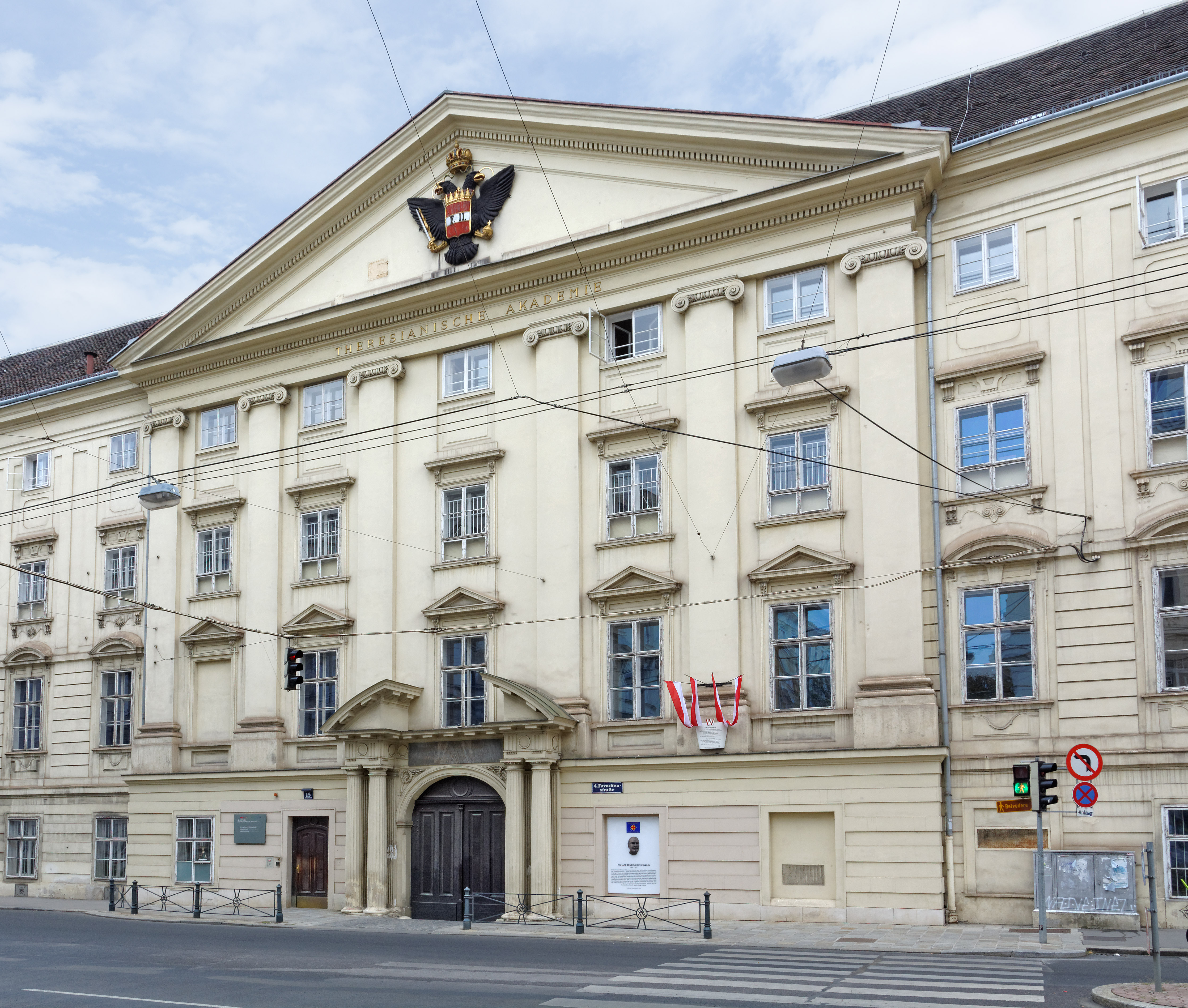 Theresianum - Mittelteil der Fassade - in Wien-Wieden, Wien, Österreich